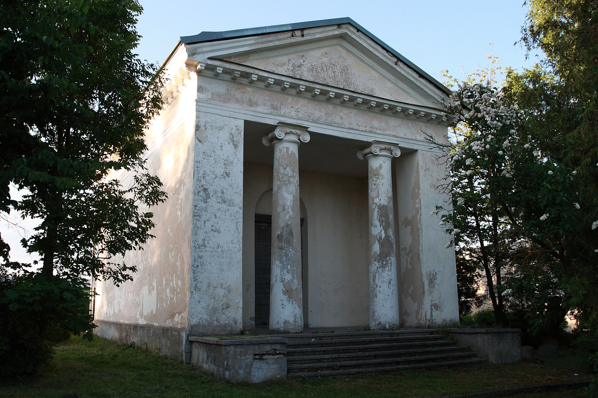 Keila kirikuaia Vääna mõisa kabel, 19.saj